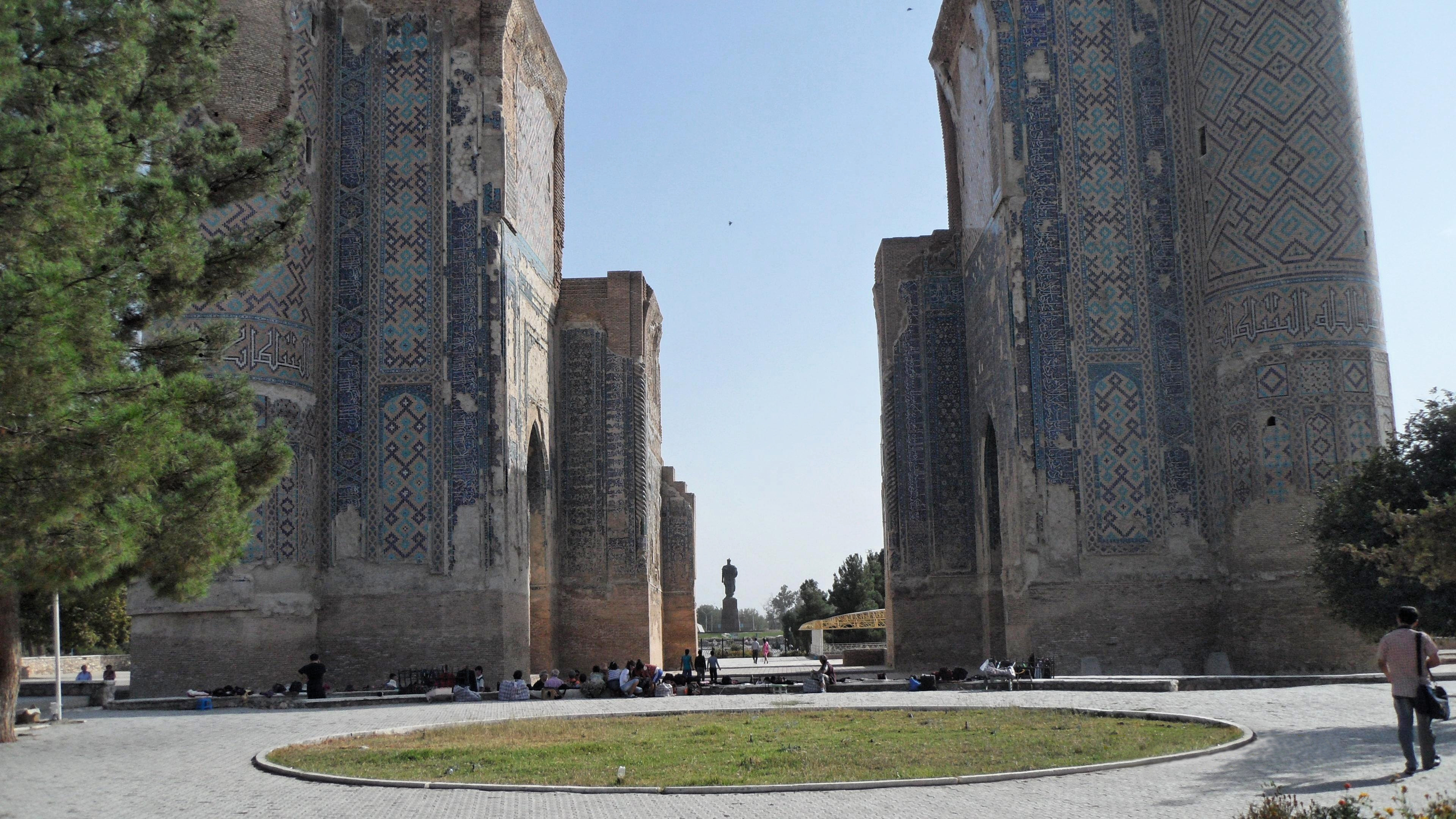 Usbekistan, Shahrisabs, Residenz Ak Sarai, der weiße Palast von 1380, mit Timurdenkmal im Hintergrund